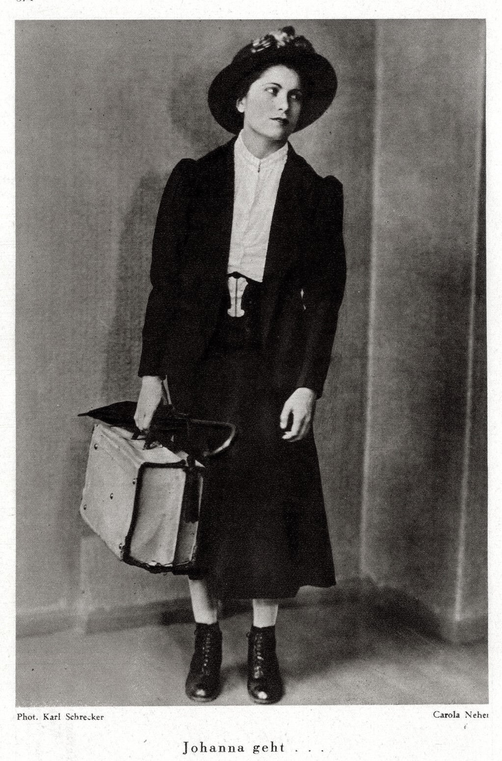 Carola Neher als Johanna in Die heilige Johanna der Schlachthöfe, 1930